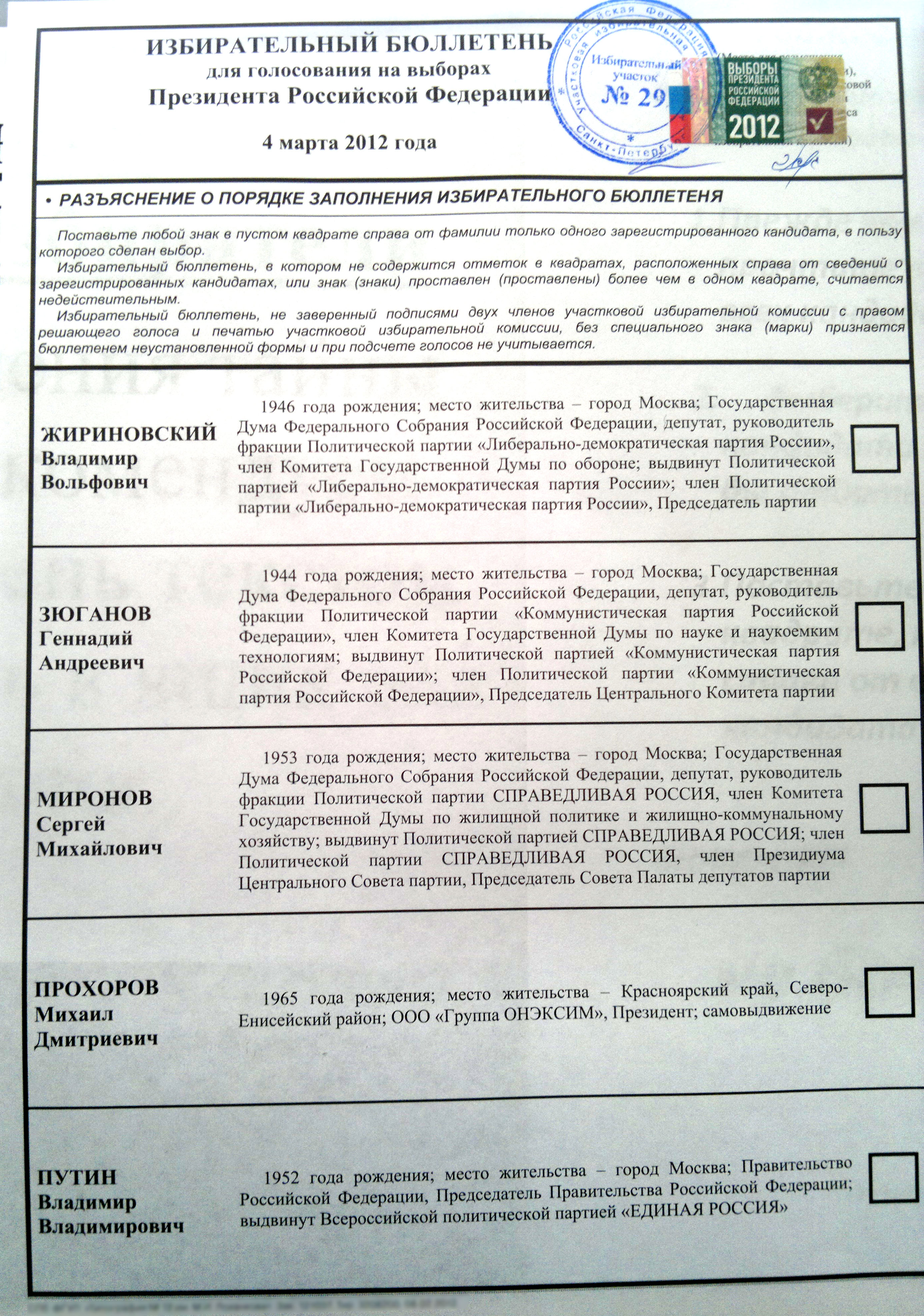 Бюллетень с кандидатами на пост Президента РФ на выборах 2012 года